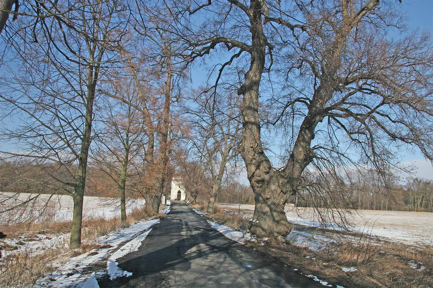 Památná lipová alej u města Zásmuky